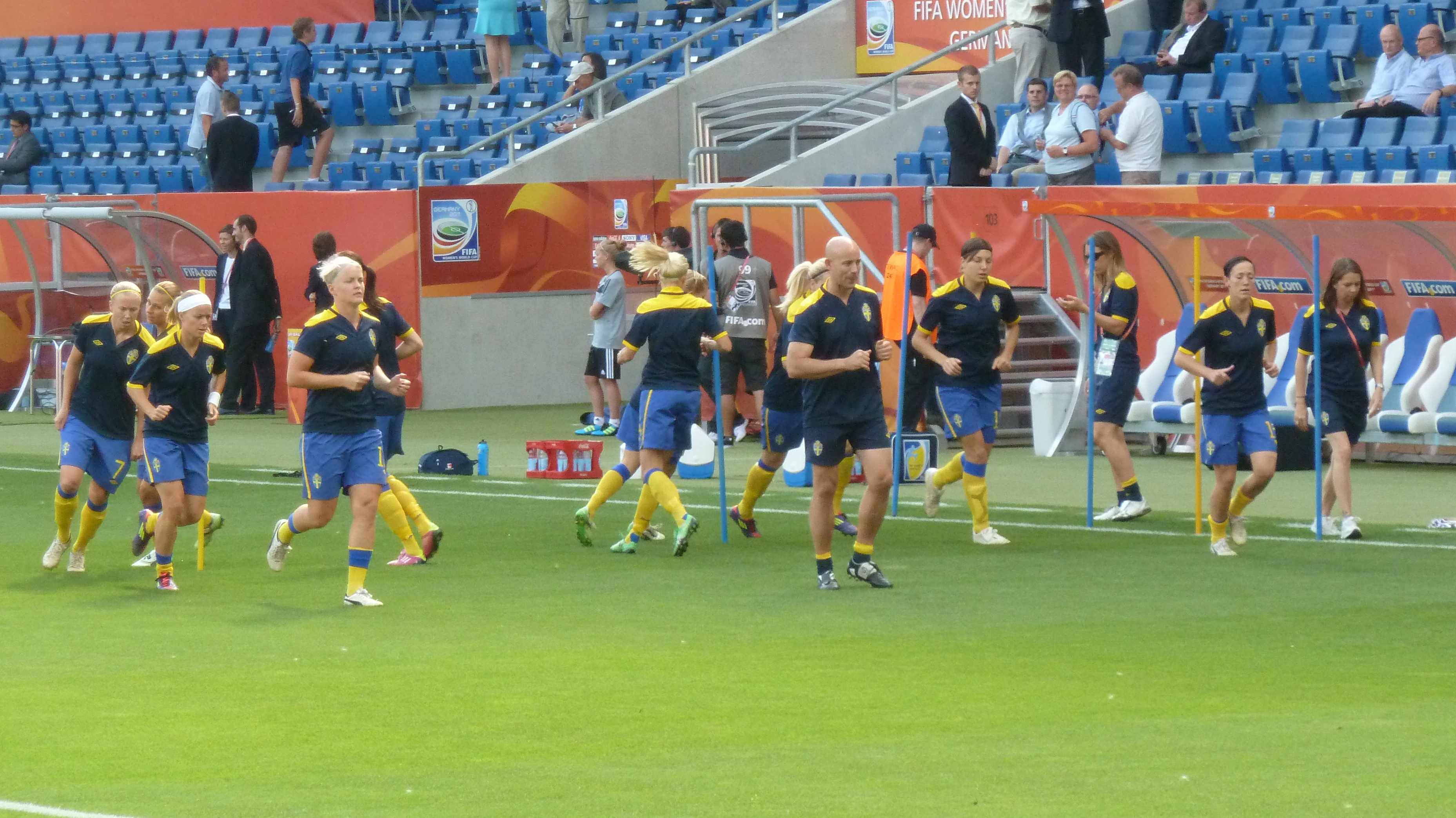 Die schwedische Nationalmannschaft der Frauen bereitet sich auf das Spiel um Platz 3 gegen Frankreich vor